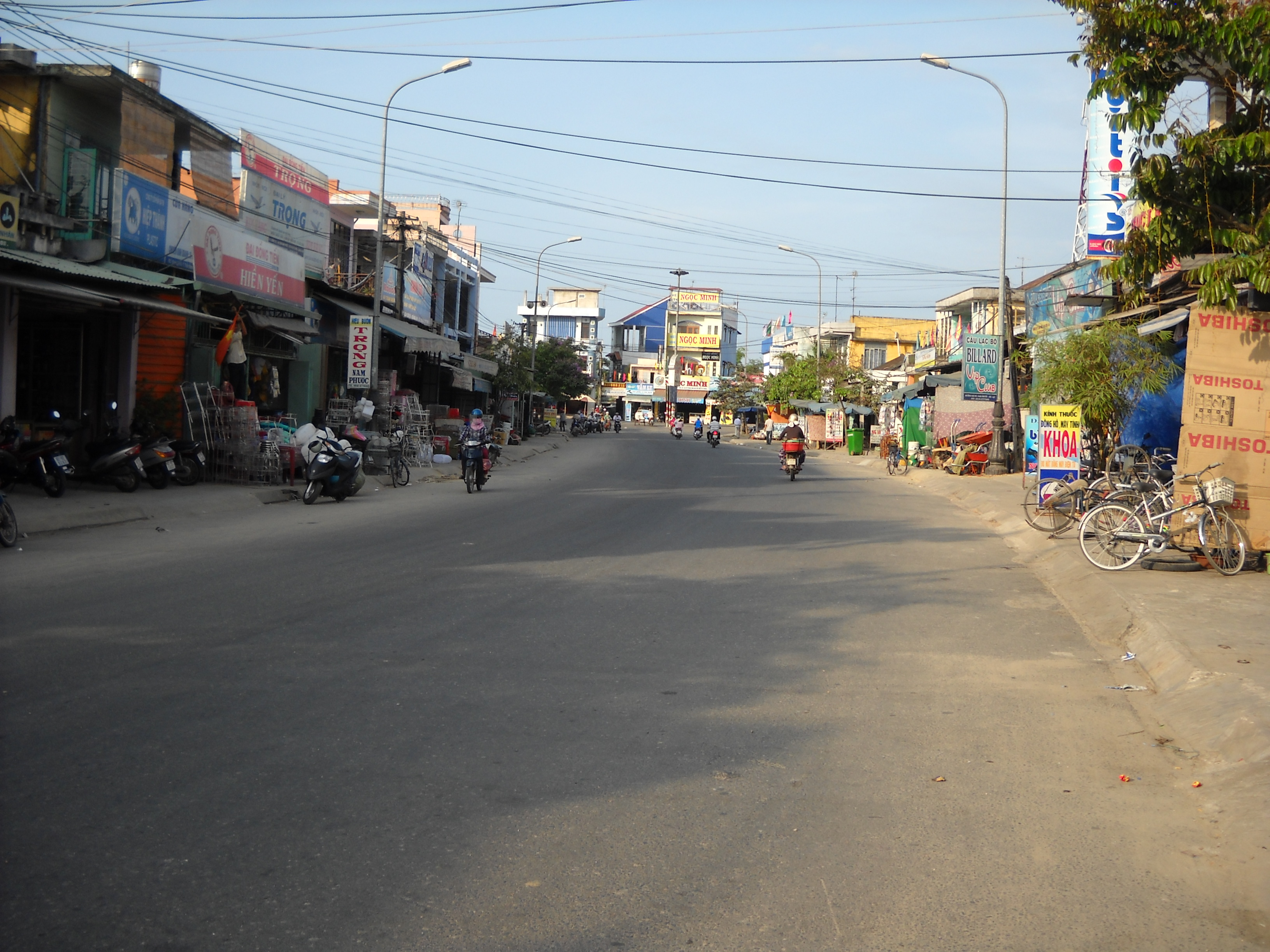 Thị trấn Nam Phước, Duy Xuyên, Quảng Nam